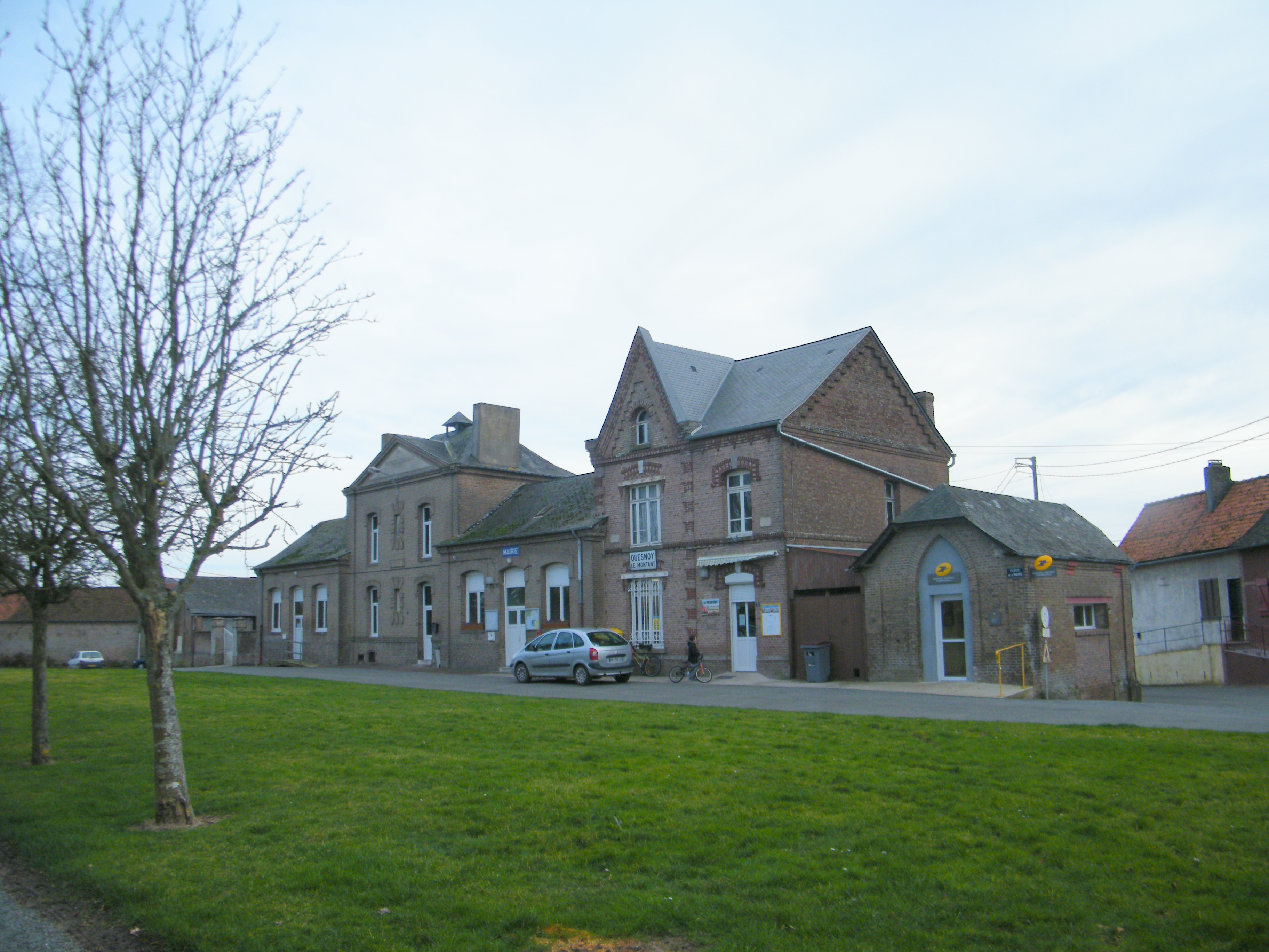 La place de Quesnoy-le-Montant, Somme, France, l'école, la mairie, l'agence postale.